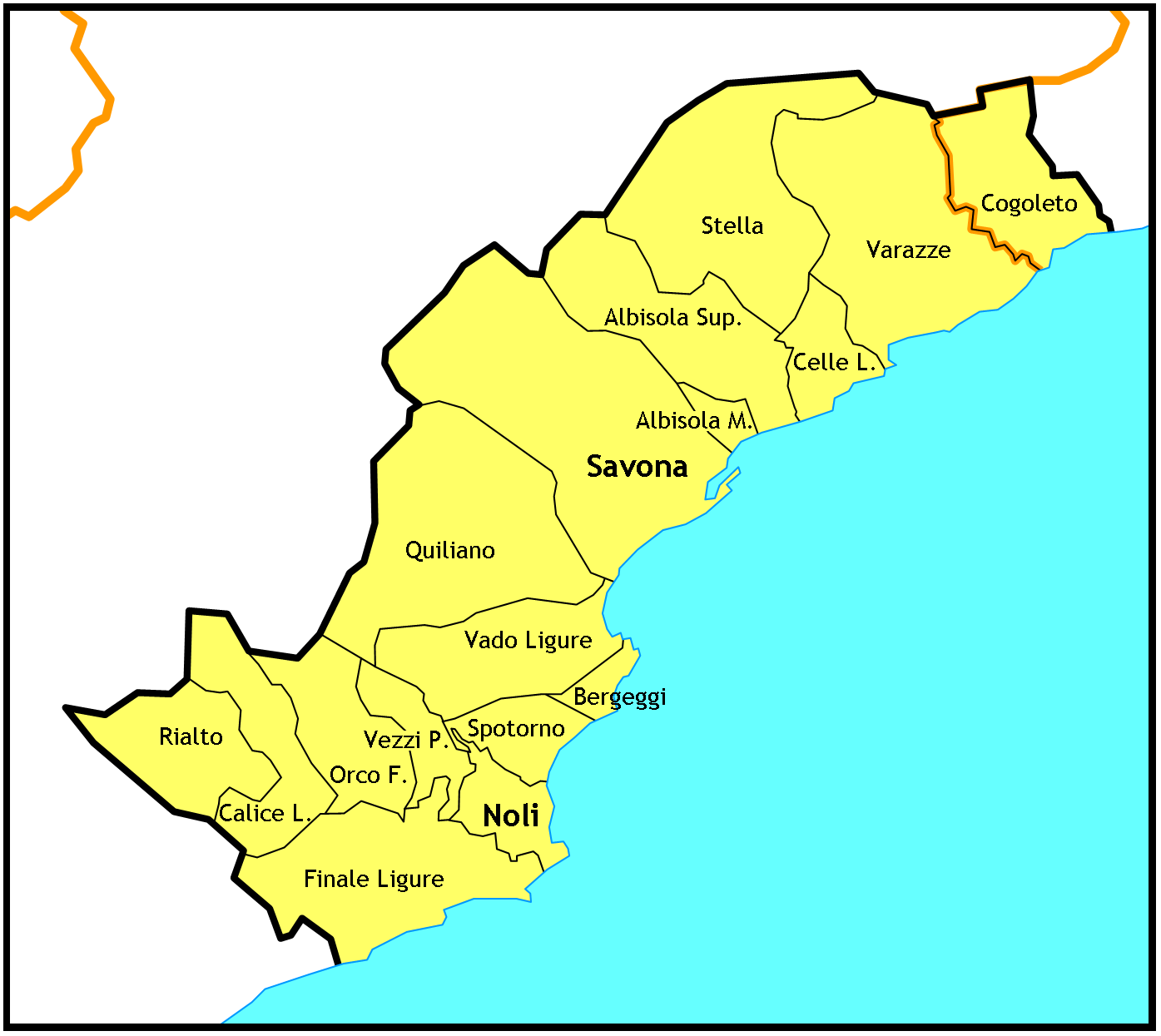 Mappa della Diocesi di Savona-Noli